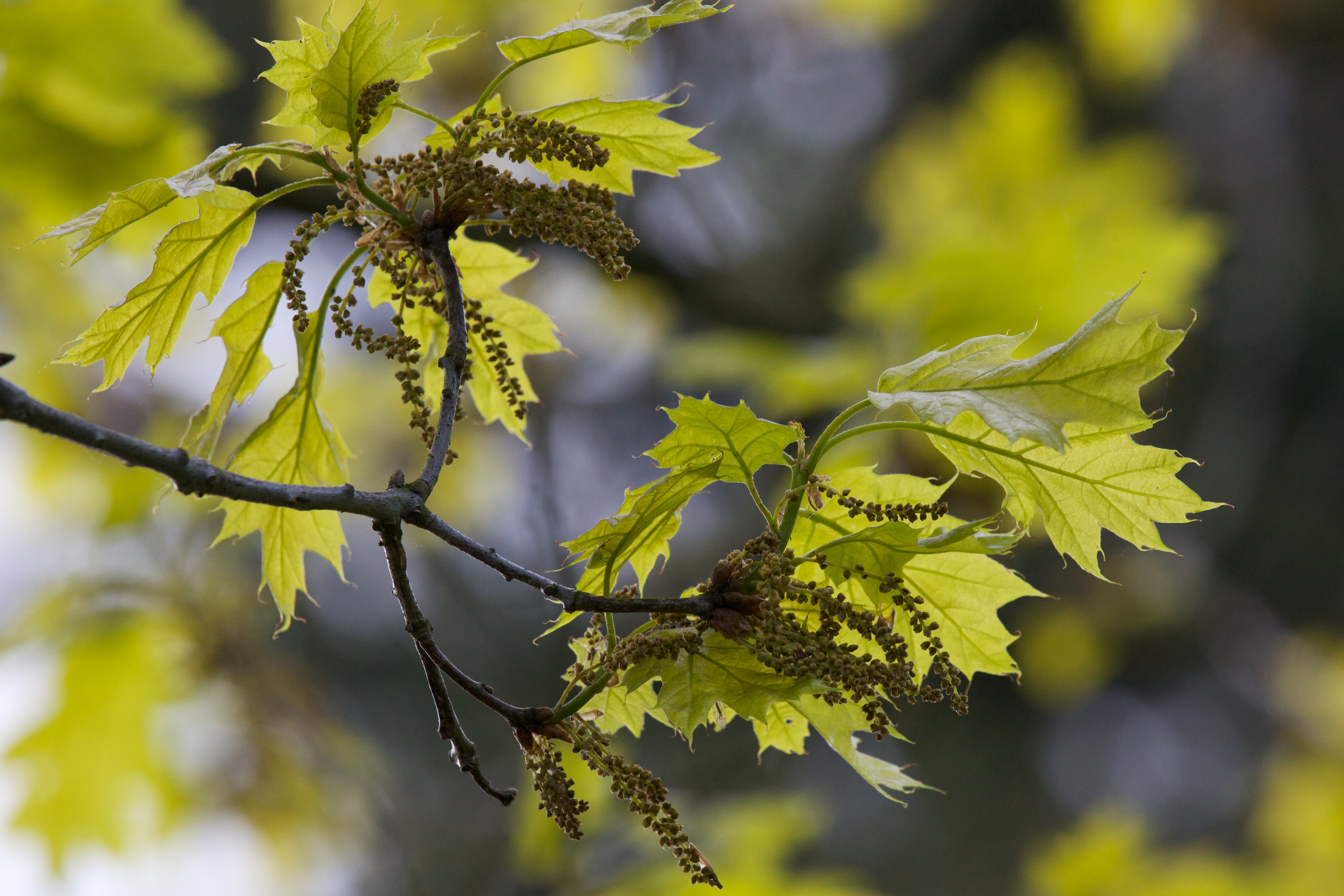 Blüte am 22.5.2010